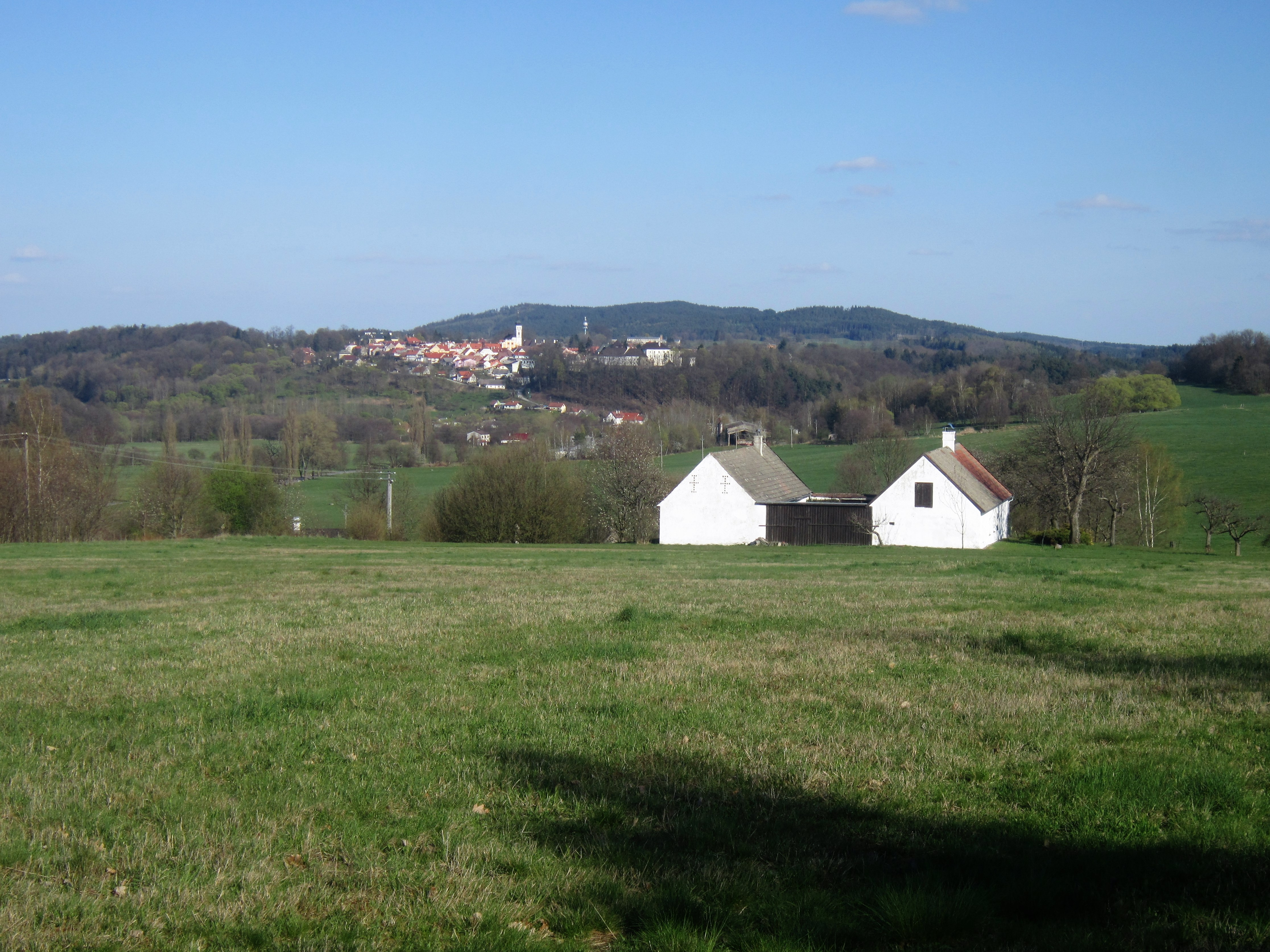 Hlinov, v pozadí město Nové Hrady.